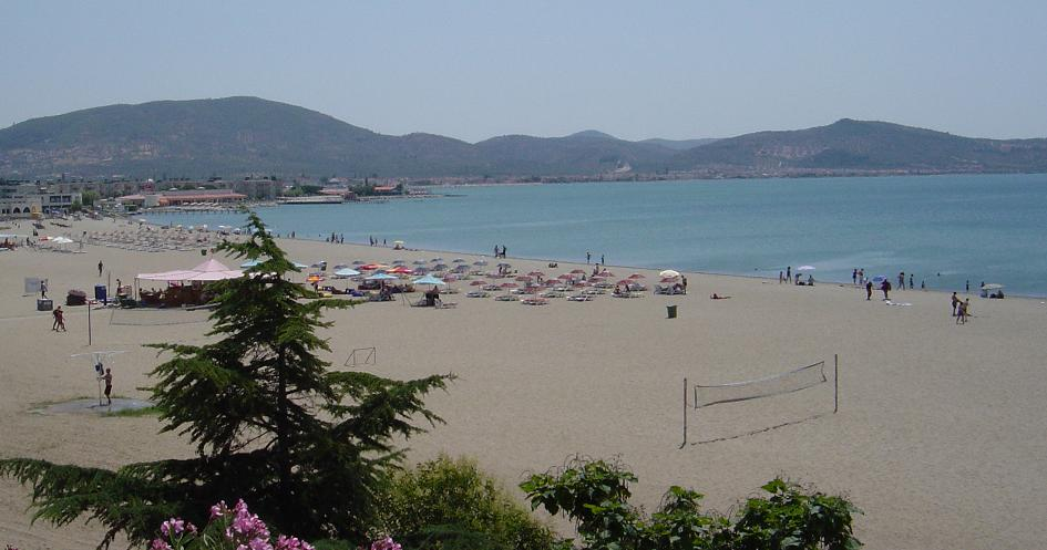 Kendi çektiğim bir fotoğraf.